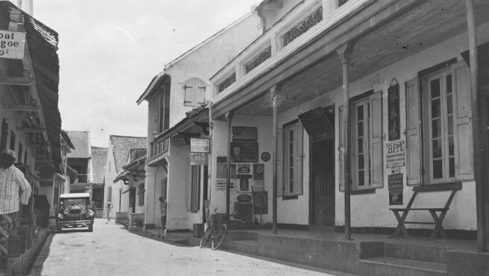 Foto. Straatbeeld van Ende op Flores